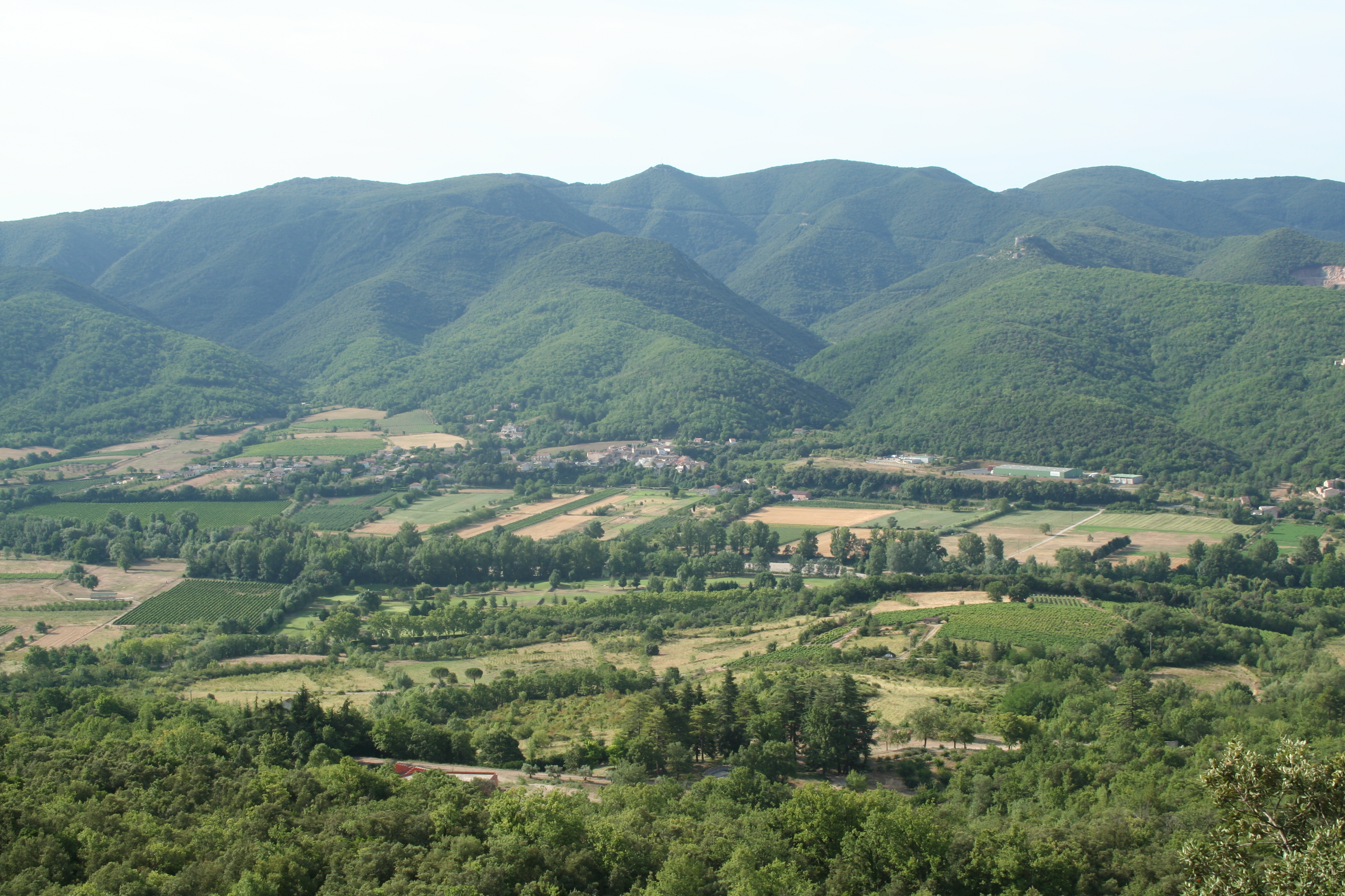 Les Aires (Hérault) - Vue générale prise depuis Capimont sur les Aires, la vallée de l'Orb et le château du Mourcairol.